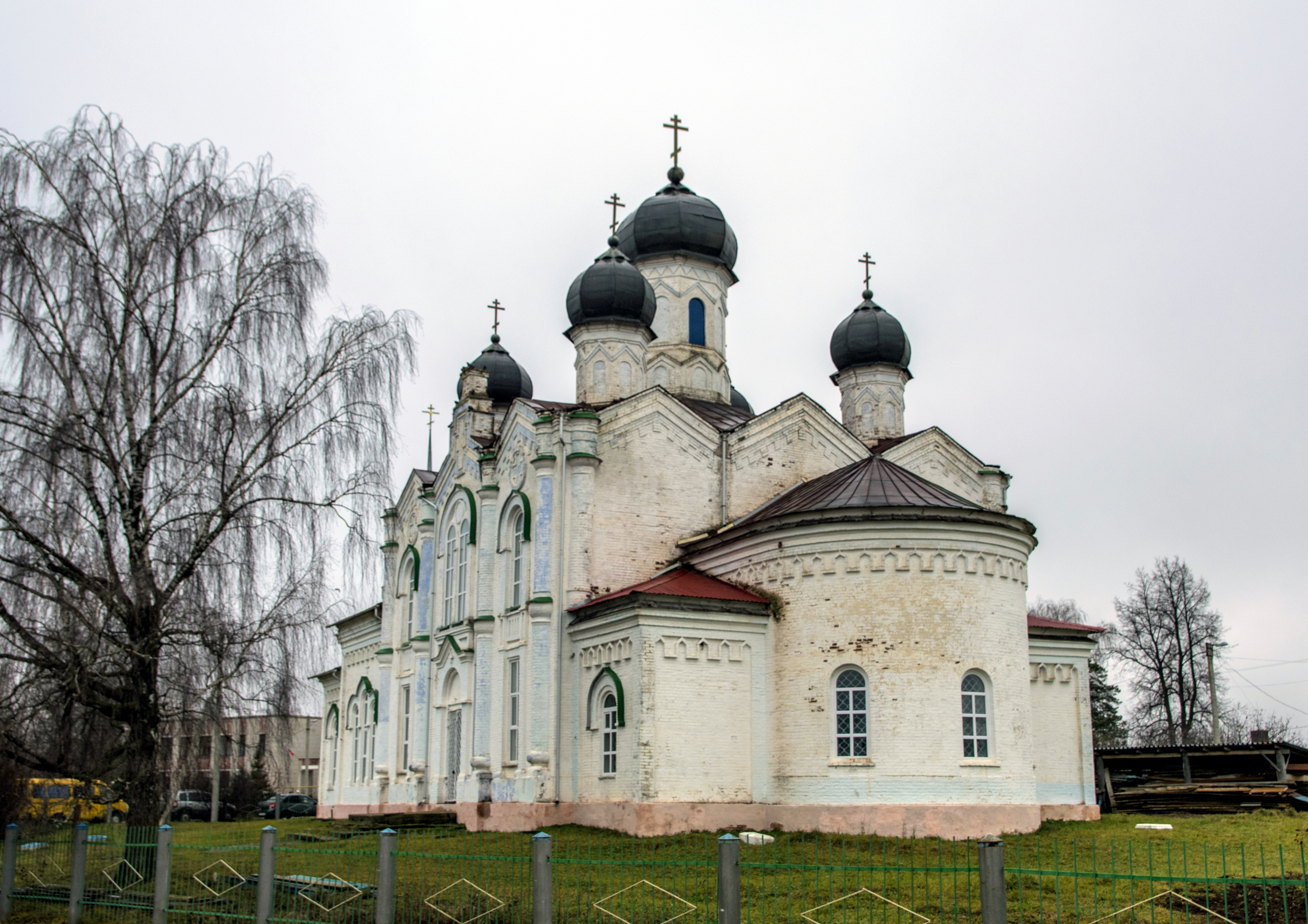 Церковь Покрова Божией Матери: Марисола, Сернурский район, Марий Эл